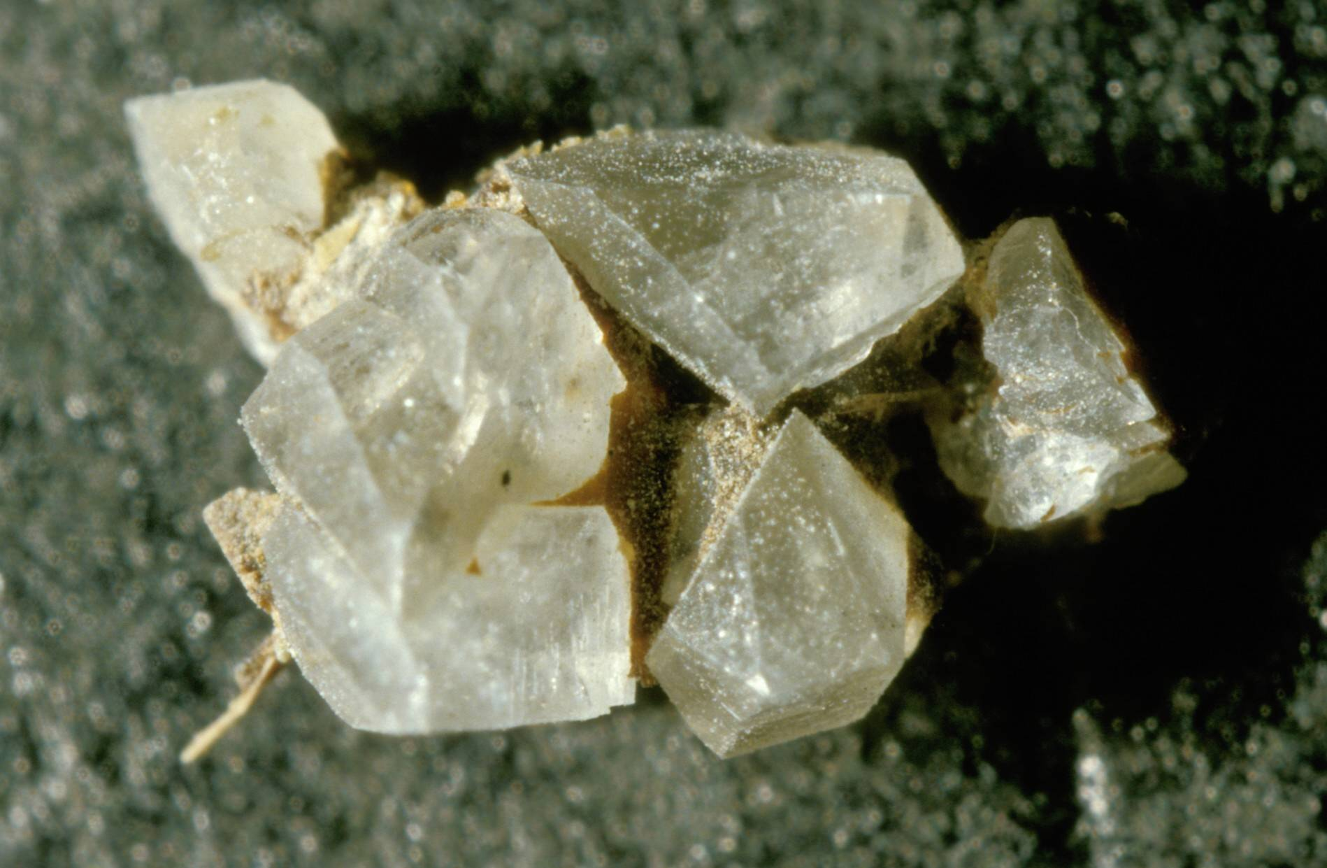 Struvit aus einer Gülleaufbereitungsanlage der TU Hannover, Bildbreite: 7,5 mm